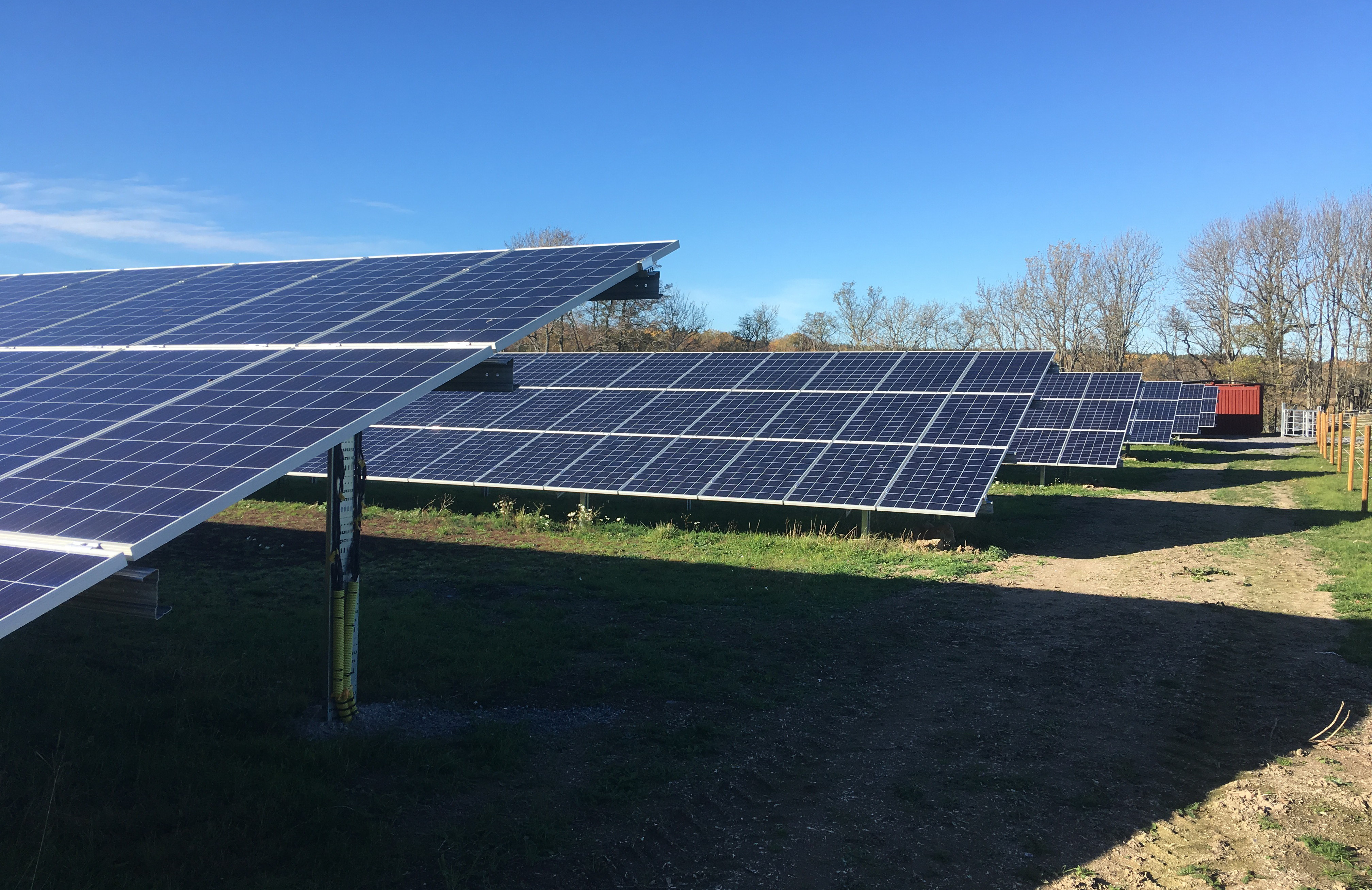 Ågesta solaranläggning i Huddinge kommun